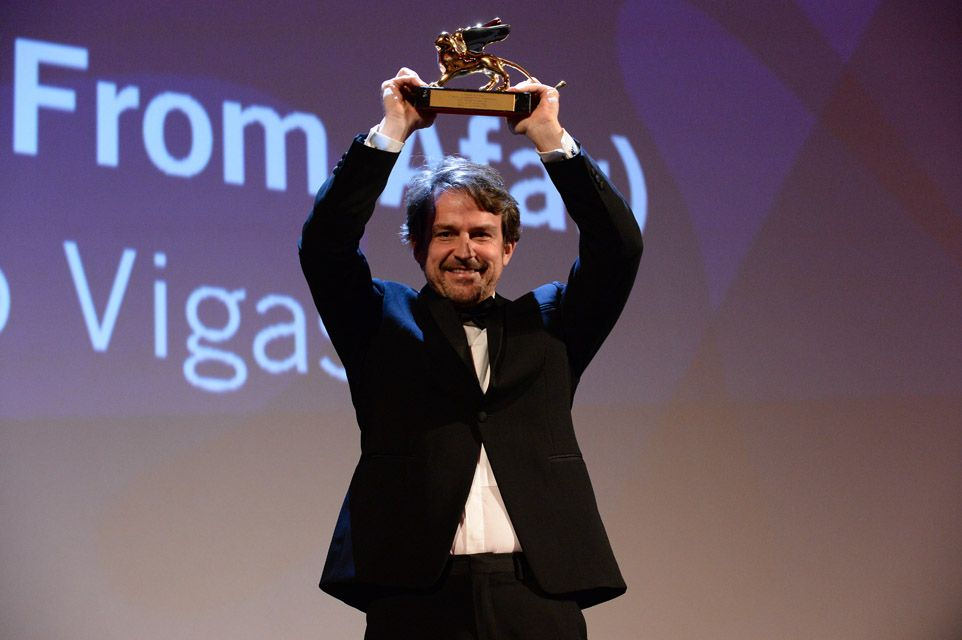 Golden Lion for Best Film frim afar